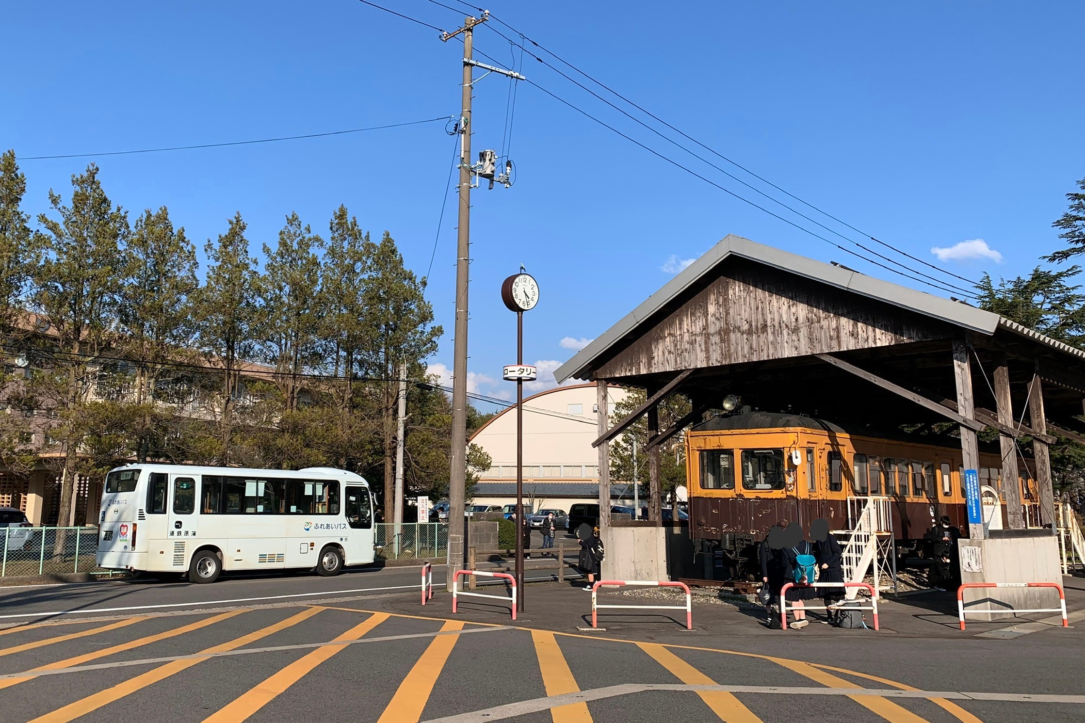 五泉高校前に保存される蒲原鉄道の車両と五泉市ふれあいバス（2020年4月）